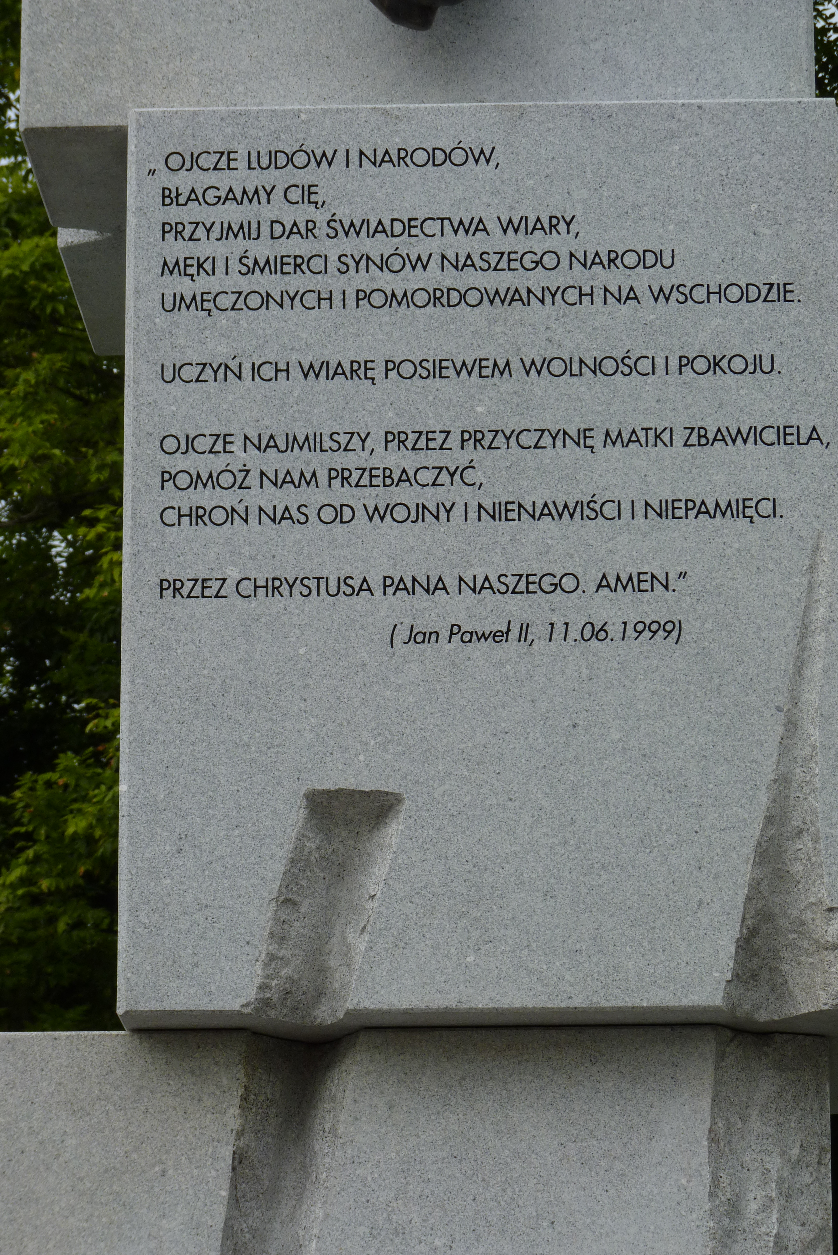 Pomnik w hołdzie ofiarom mordu wołyńskiego